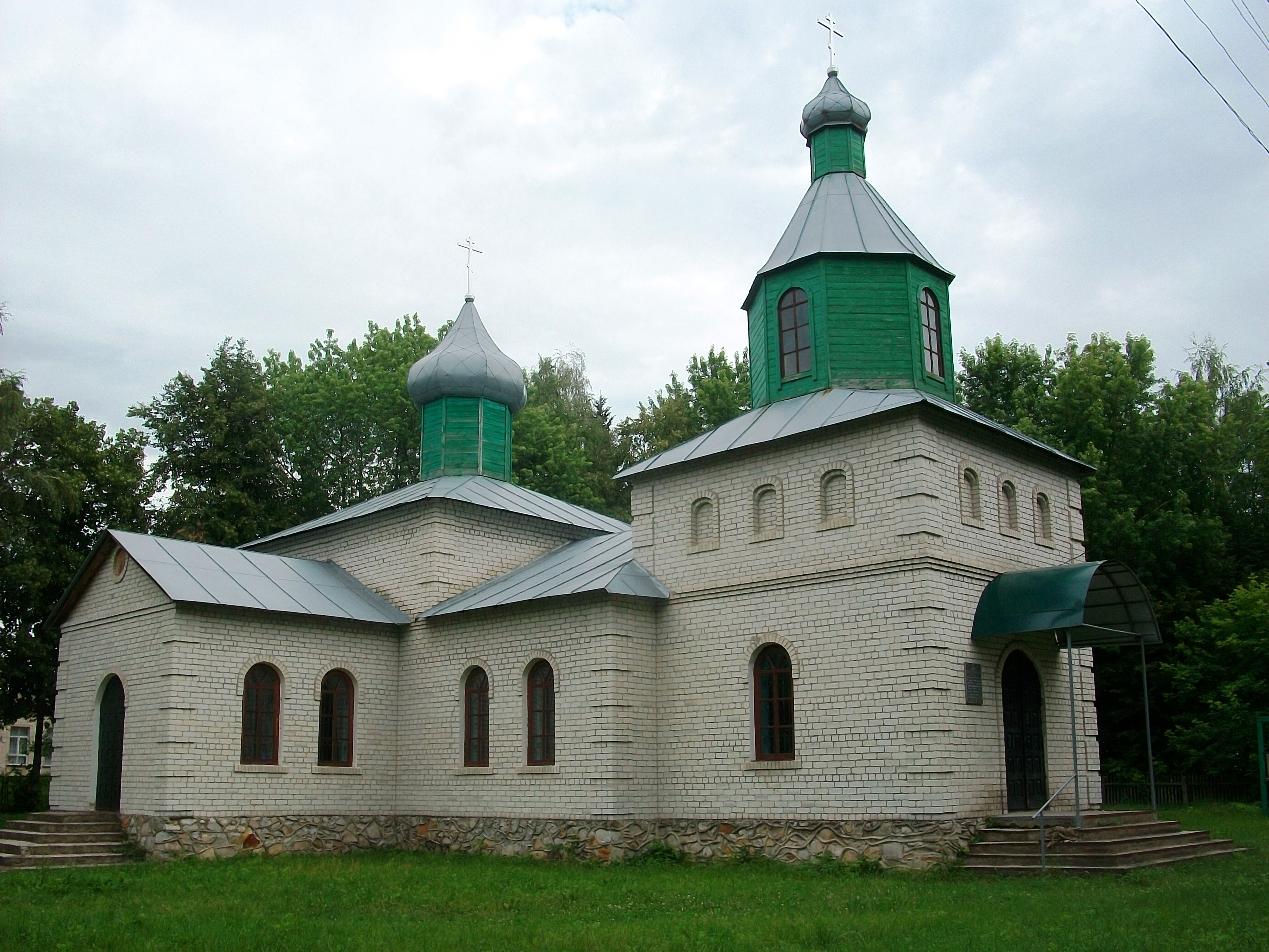 Слоут. Храм Різдва Богородиці. Вигляд 2